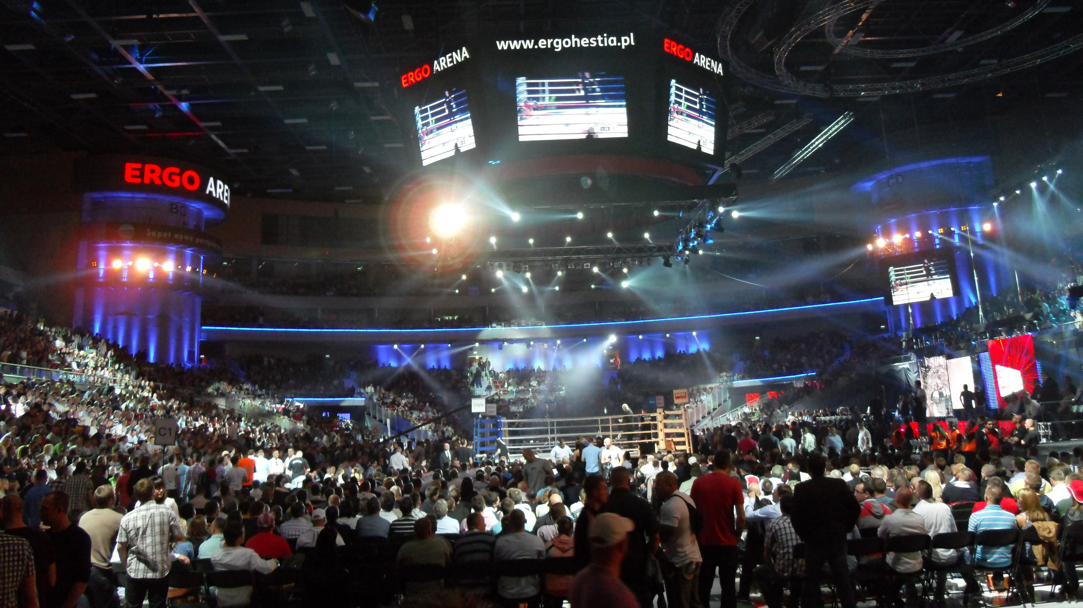 Hala Ergo Arena, na granicy Gdańska i Sopotu - wnętrze, KSW XVI.